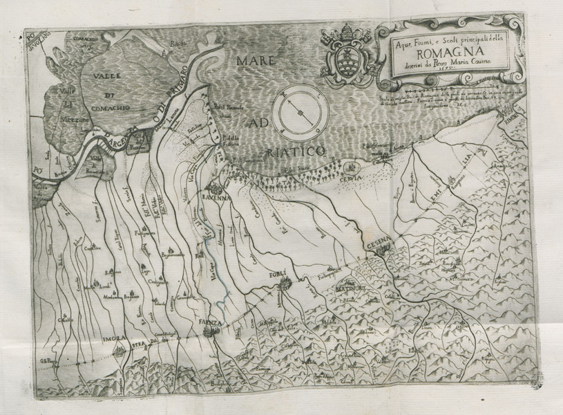 Mappa della Romagna nel 17esimo secolo. Tratto da Commercio de due mari Adriatico e Mediterraneo